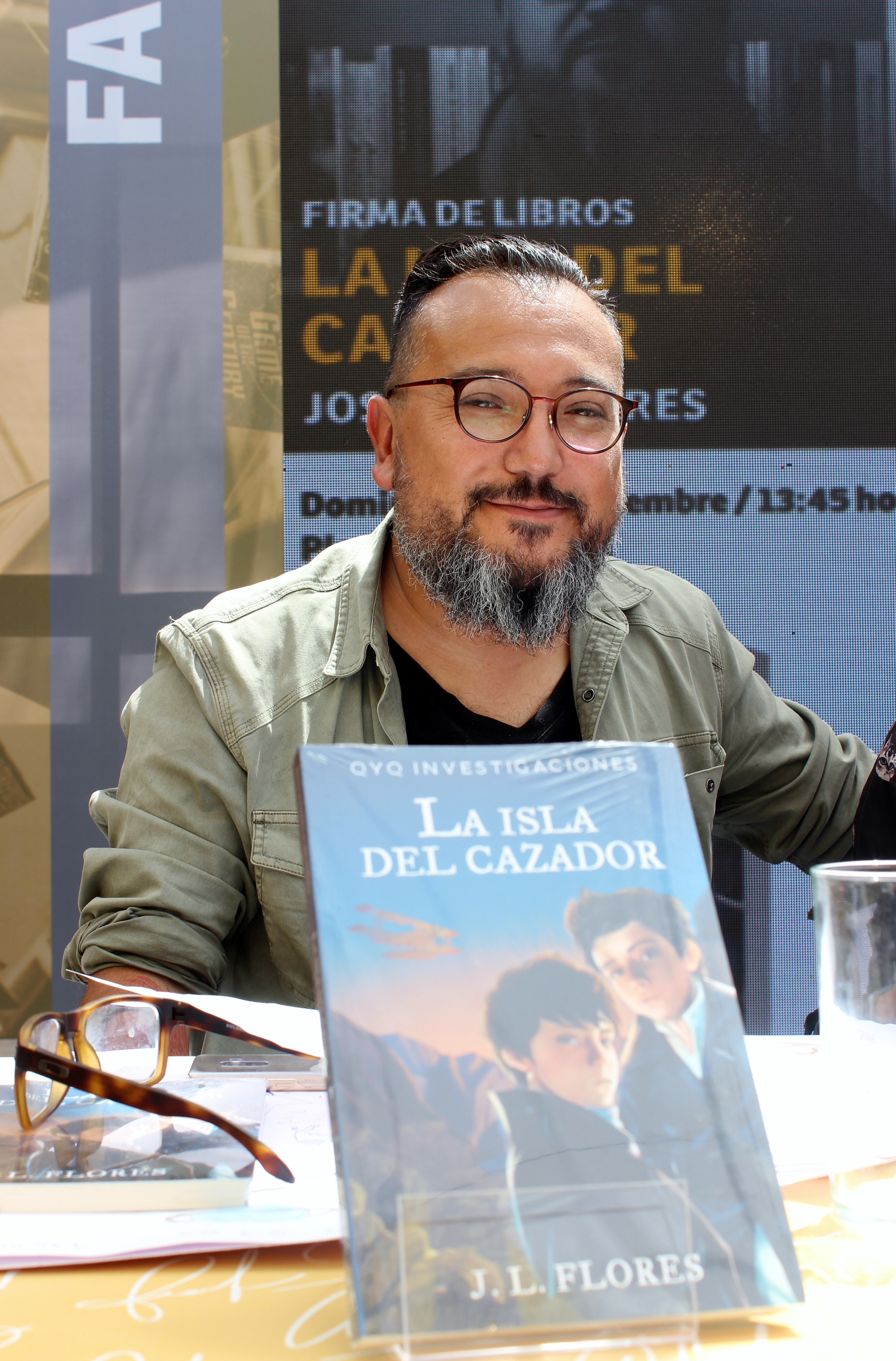 El escritor chileno José Luis Flores durante una sesión de firma de libros en la segunda etapa del Festival de Autores de Santiago 2018 realizada en el GAM.